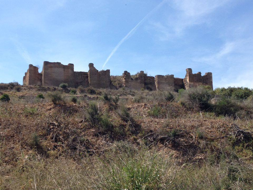 Ruinas del castillejo de Monteagudo, siglo XII, Murcia, Región de Murcia, España.